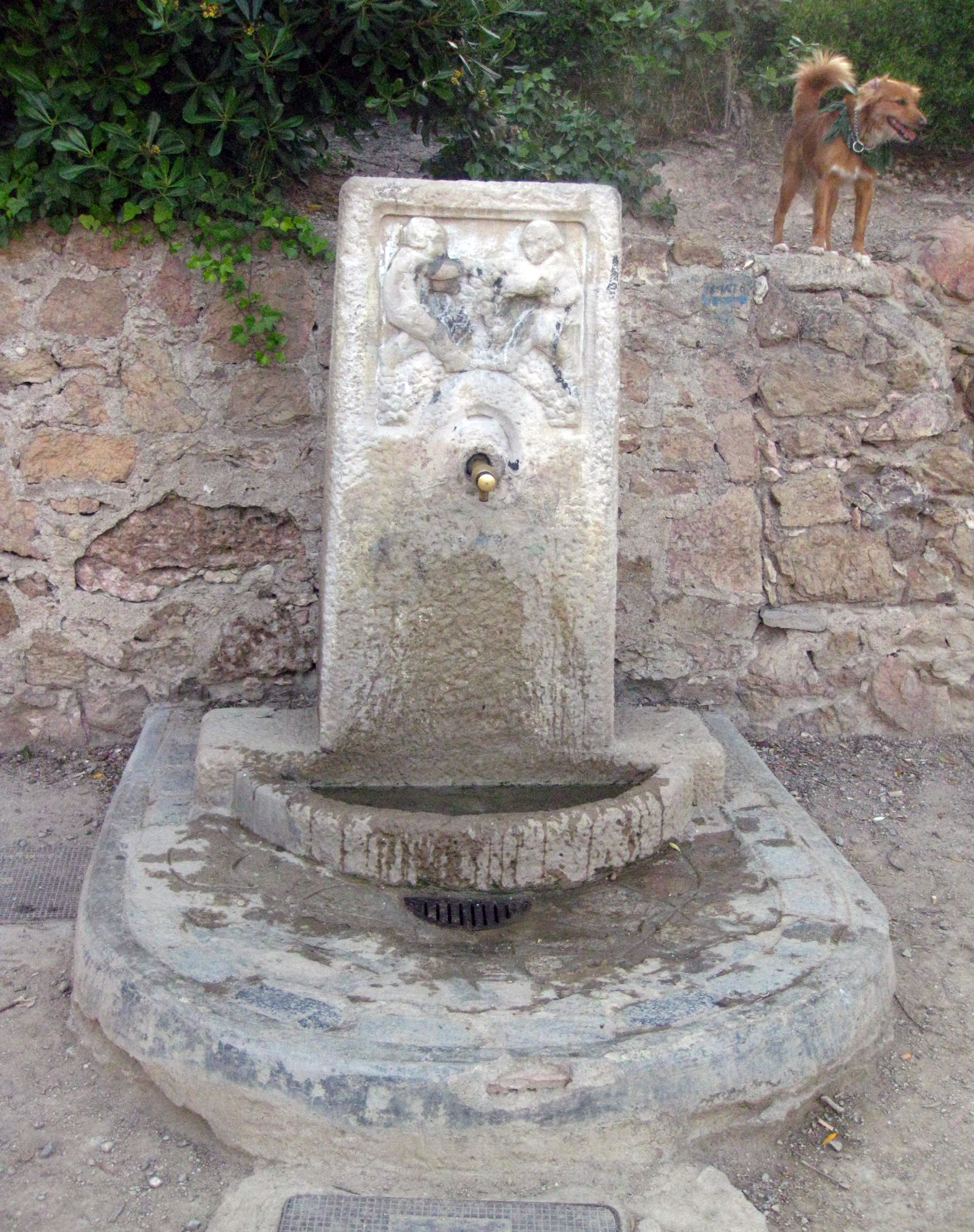 Font amb relleu de nens. Parc de Monterols (Barcelona)